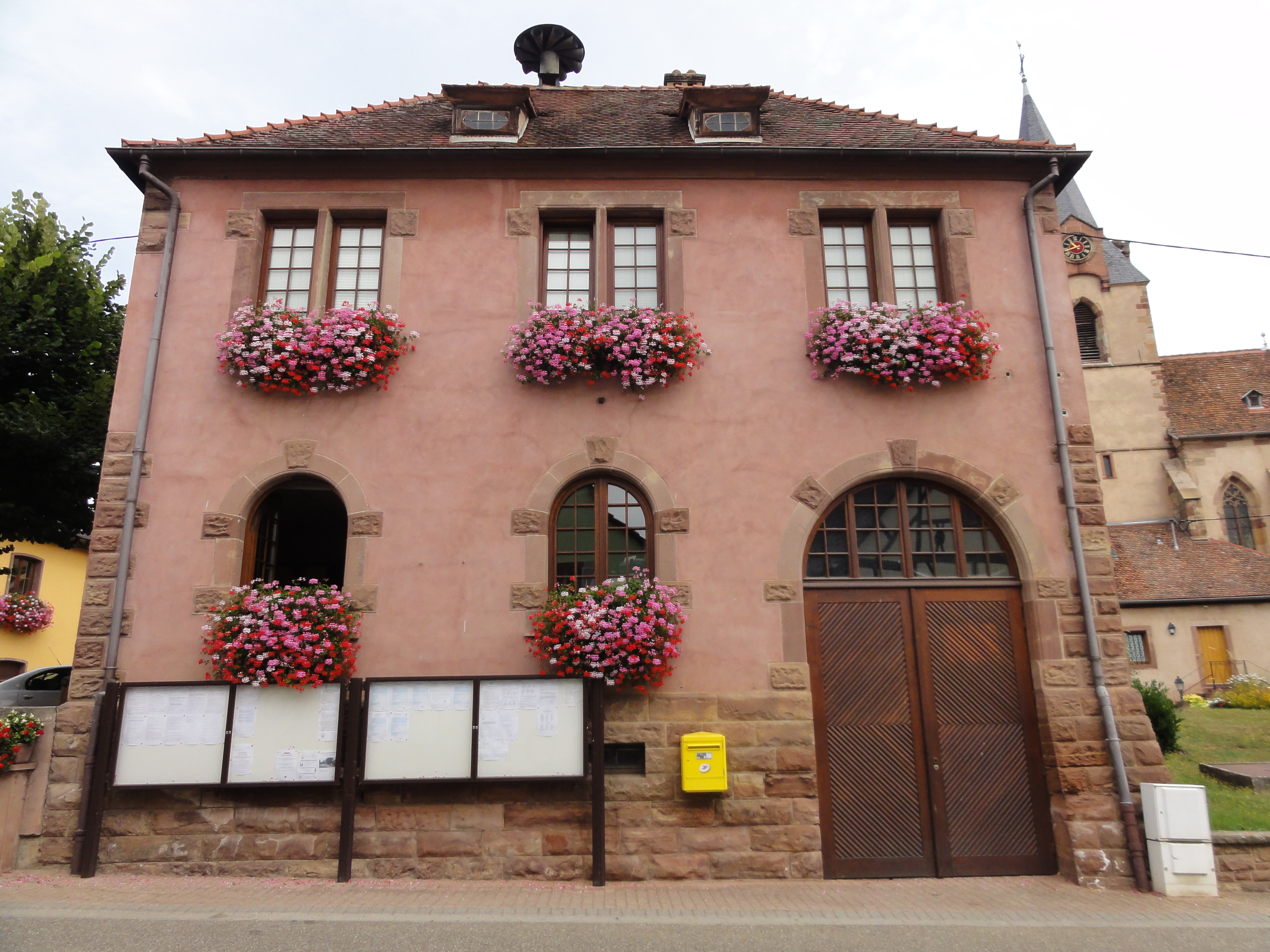 Alsace, Bas-Rhin, Rosenwiller, Mairie (XIXe).